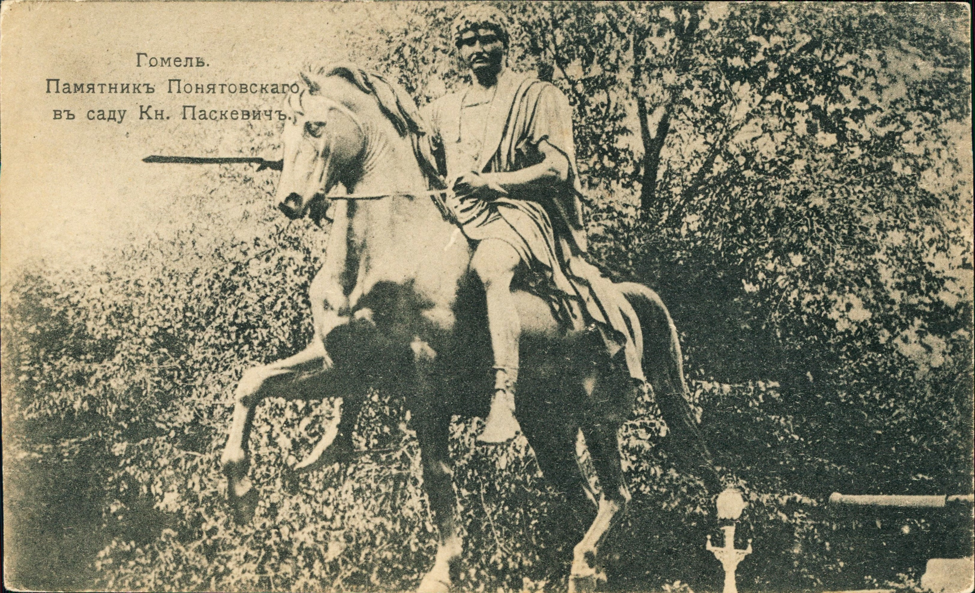 Беларуская (тарашкевіца): Гомель (Homiel), помнік Юзэф Панятоўскі (Juzef Paniatoŭski)